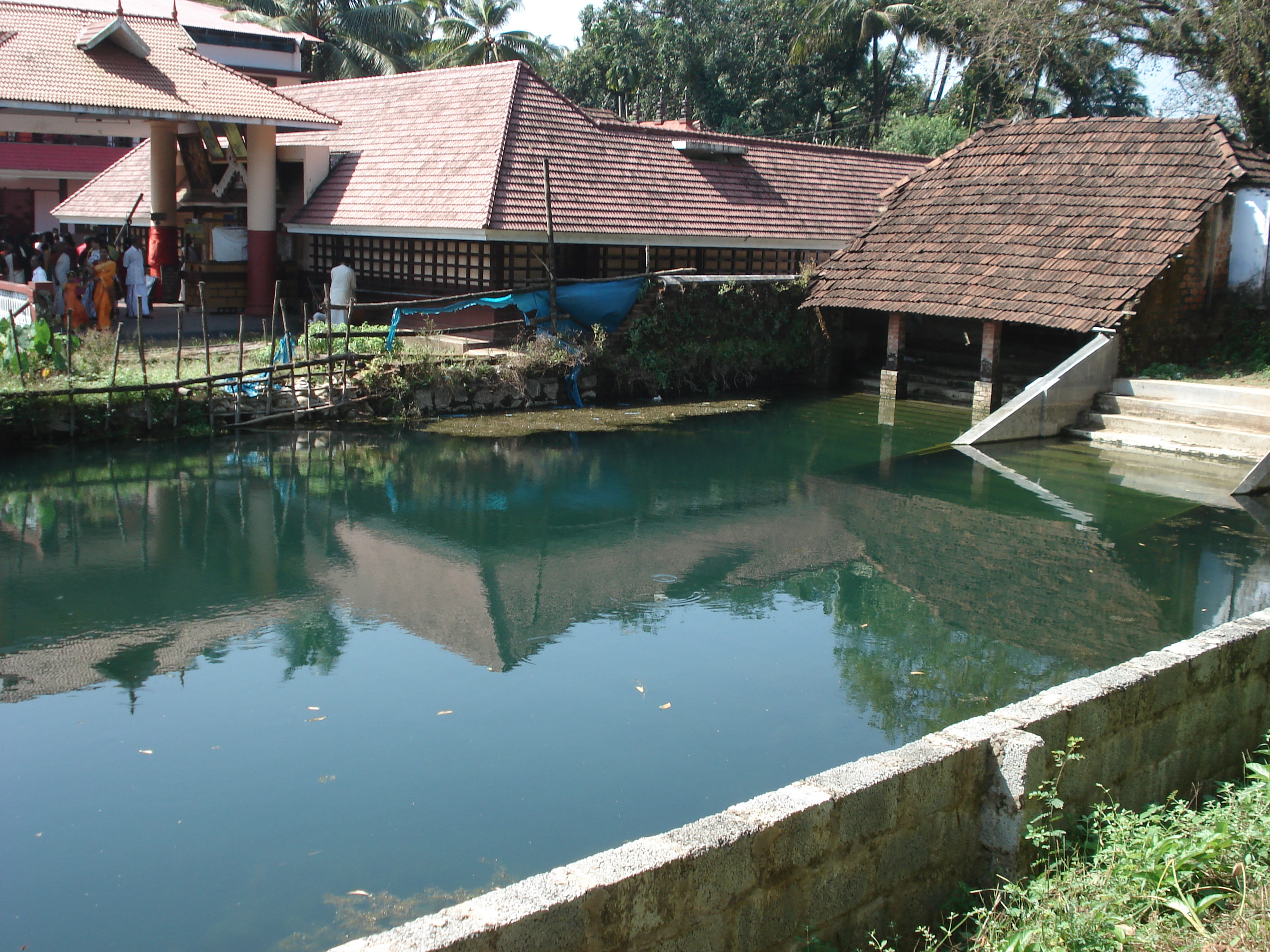 ക്ഷേത്രക്കുളം